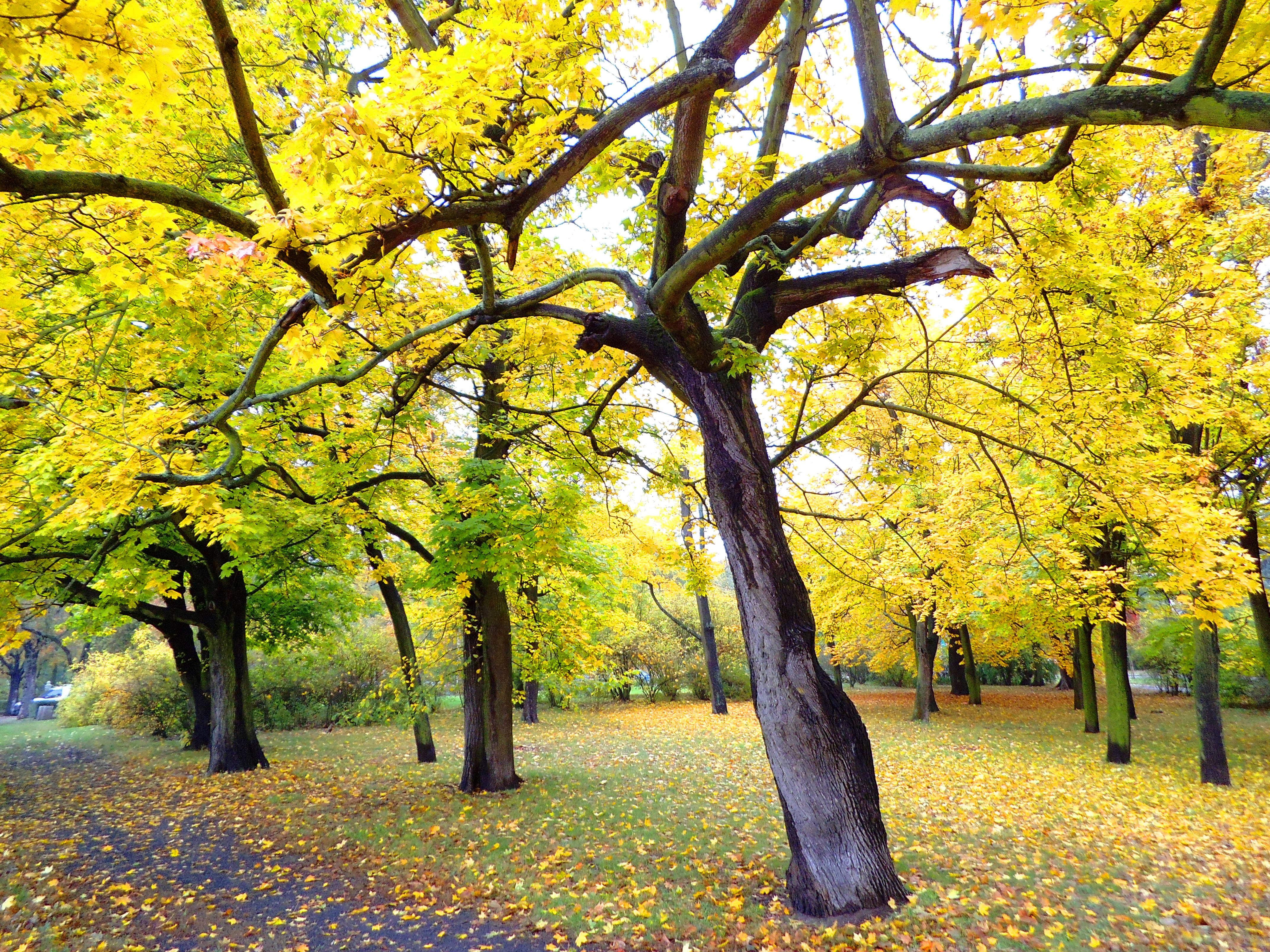 Park przy ulicy Chopina w Toruniu56